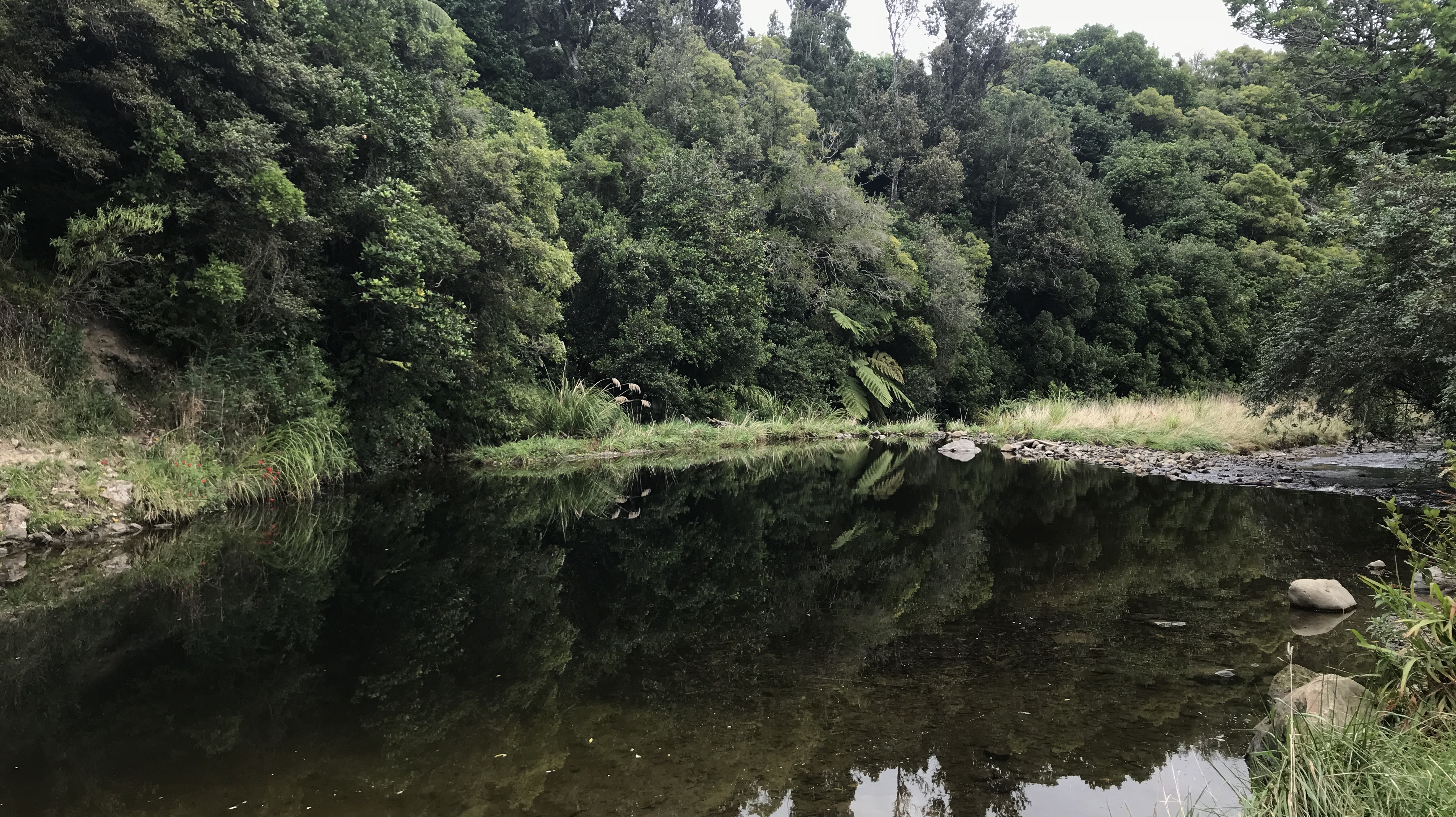 Tokomaru River at Horseshoe Bend Reserve